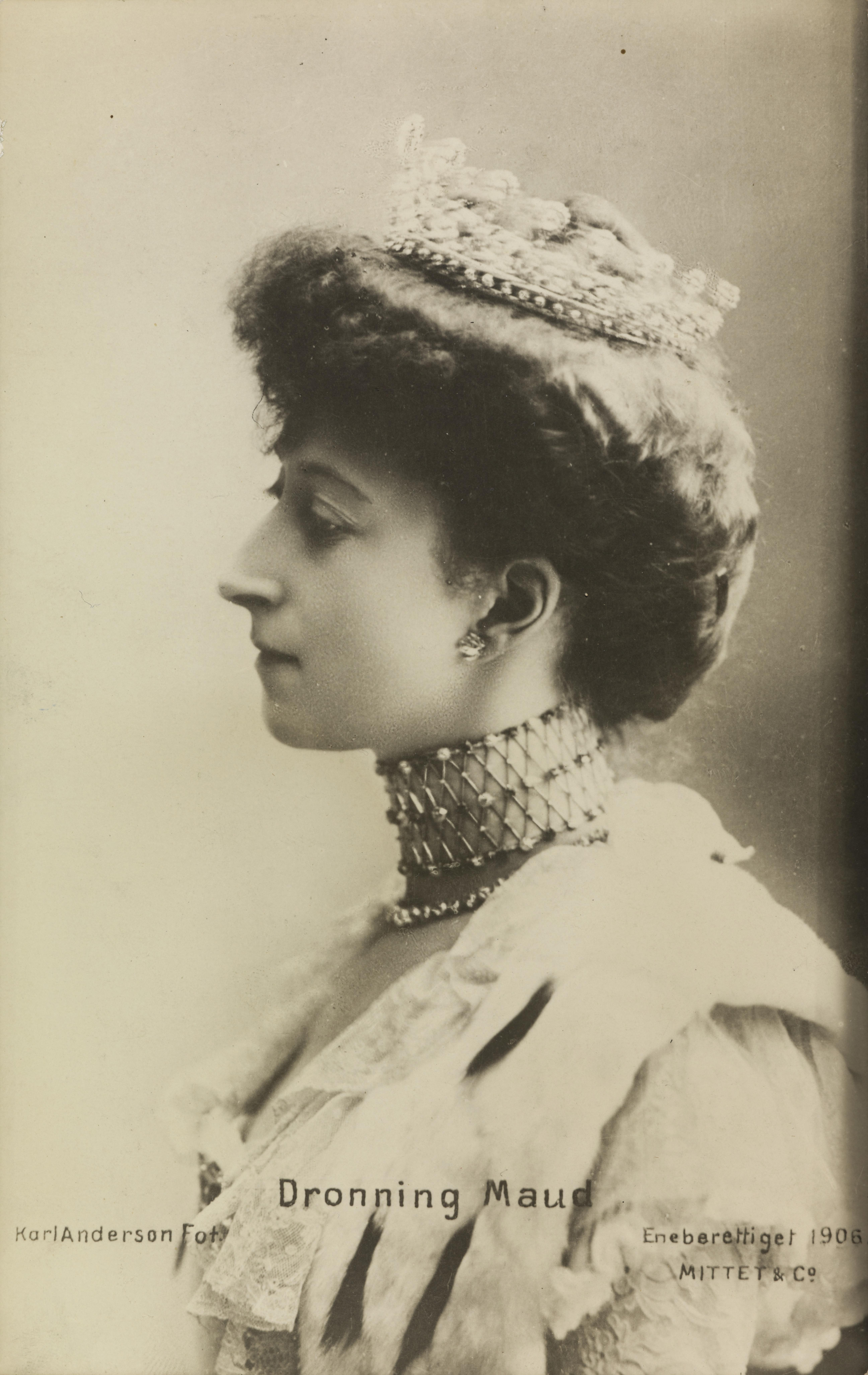 Bildet er hentet fra Nasjonalbibliotekets bildesamling Depicted person: Maud dronning av Norge